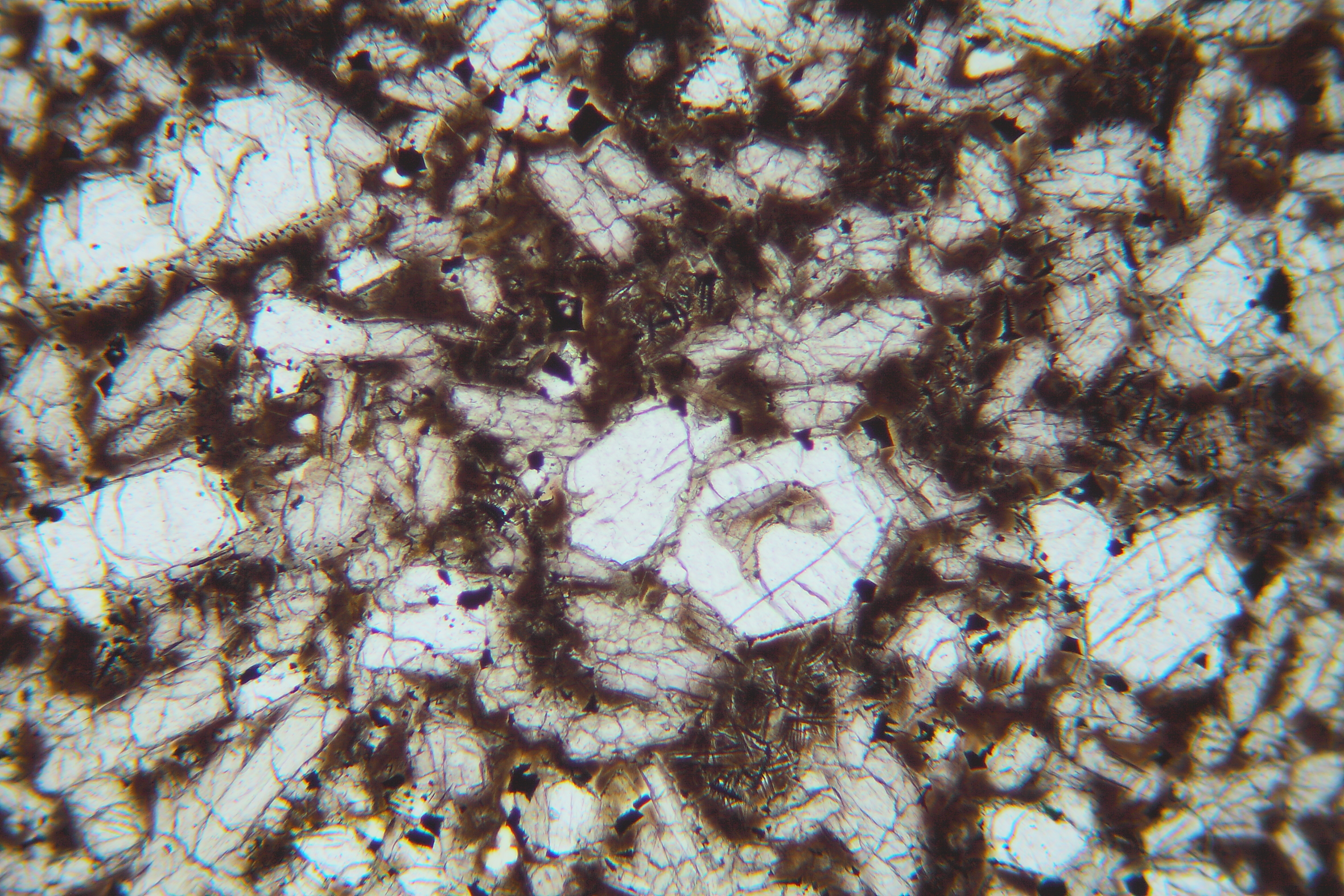 Limburgit (Dünnschliff) mit Olivin, Pyroxen und Magnetit in glasiger Matrix, LPL